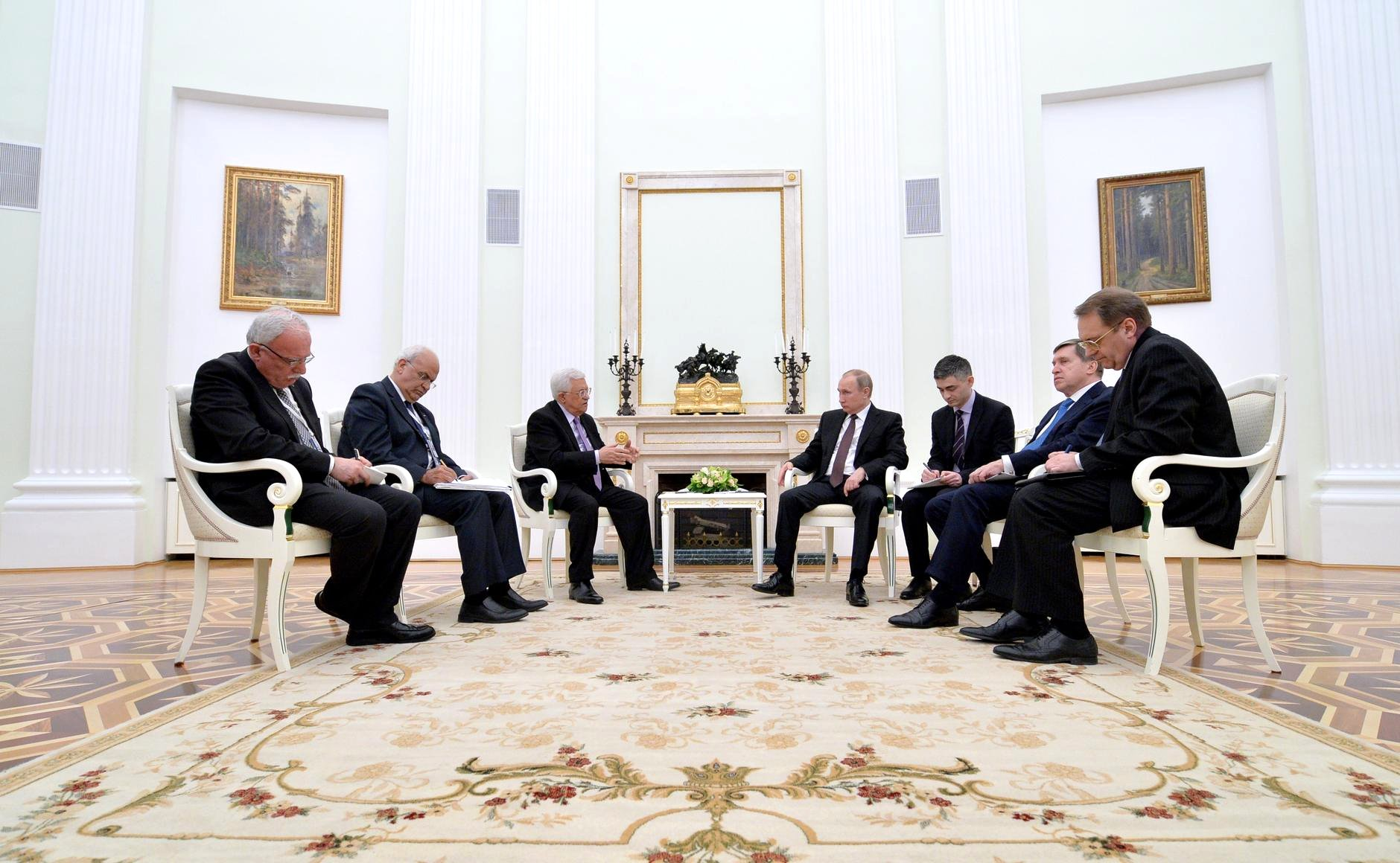 Встреча Президента России Владимира Путина с Президентом Государства Палестина Махмудом Аббасом